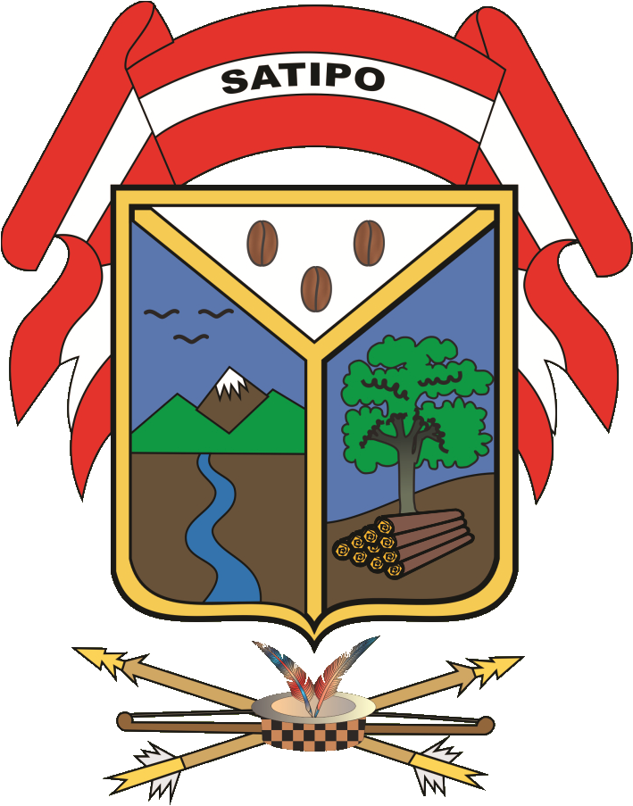 escudo satipo